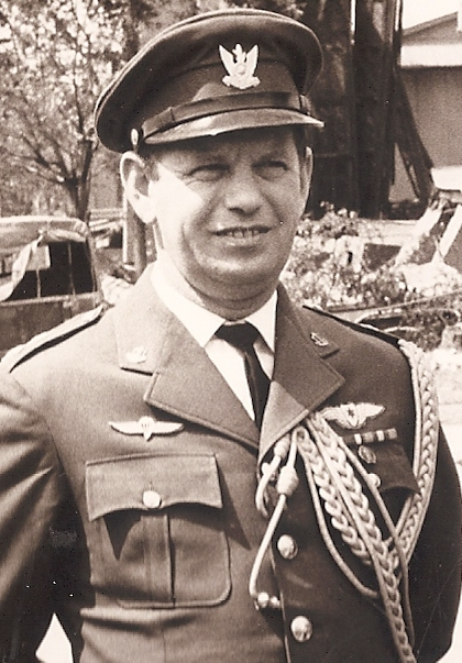 יוסף עופר היה סופר וטייס ישראלי, מראשוני חיל האוויר הישראלי. במדי ייצוג בעת שירותו כנספח אווירי בלונדון 1967